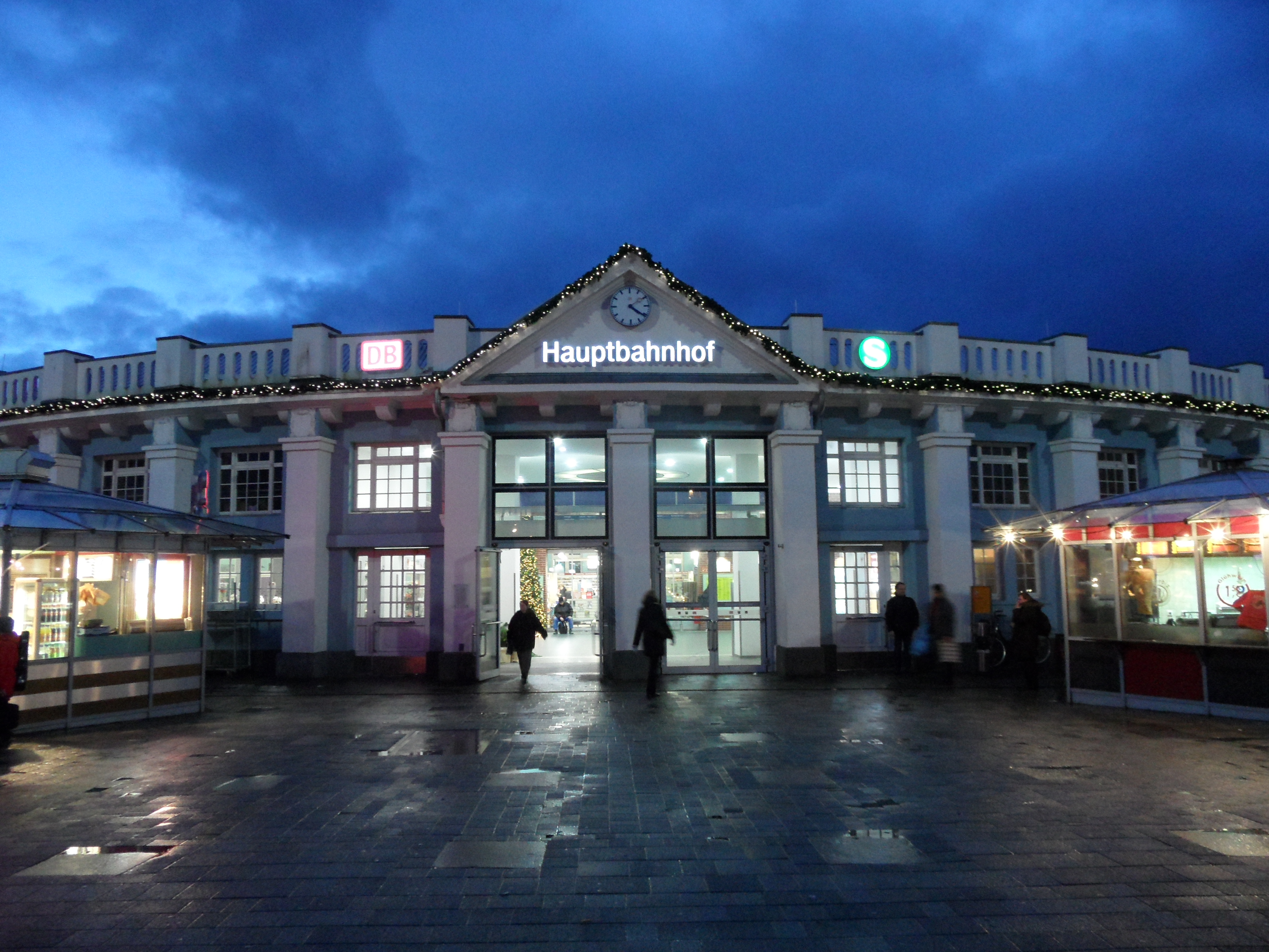 Rostock Hauptbahnhof - Hauptzugang von Norden